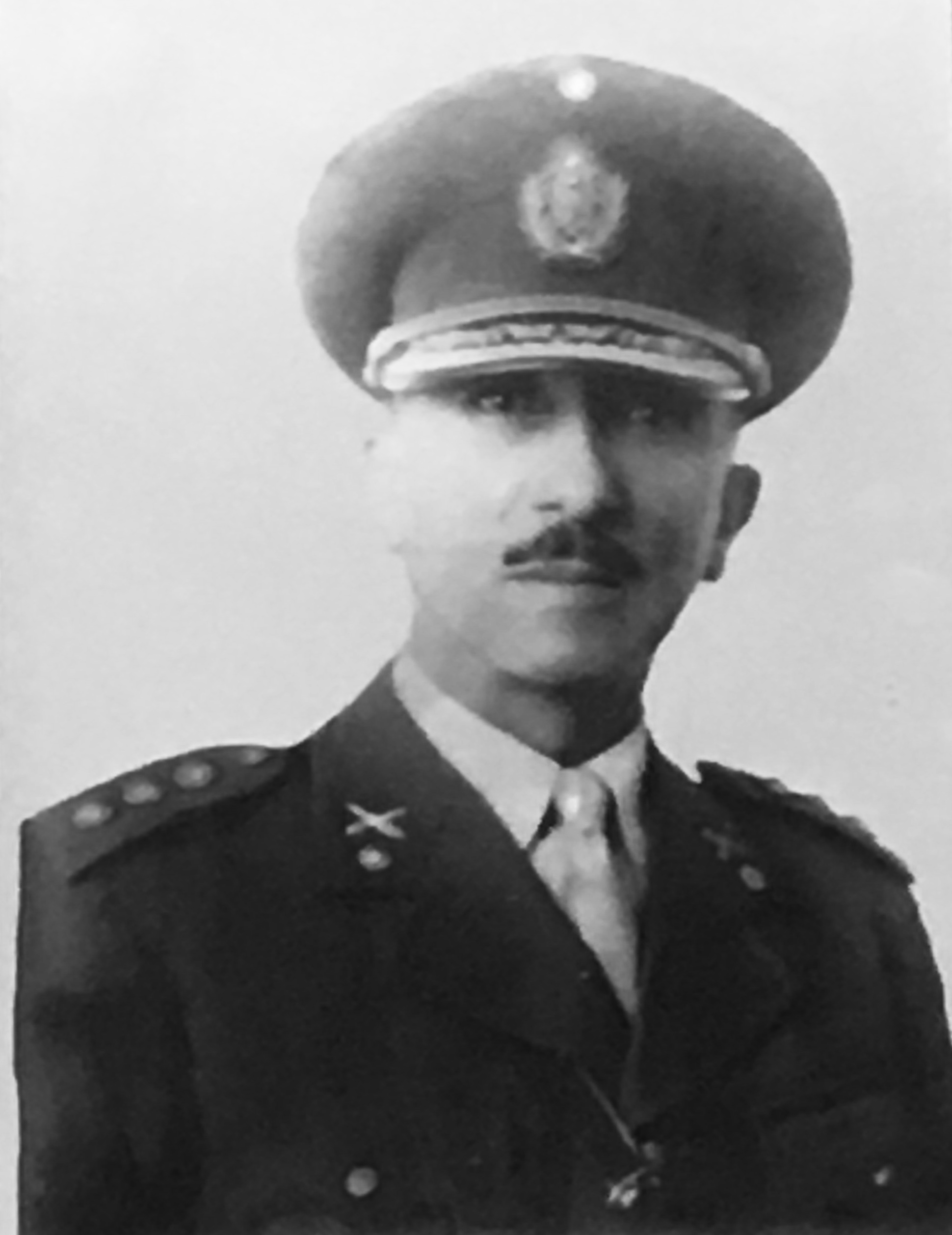 Fotografía del Gobernador en 1950.